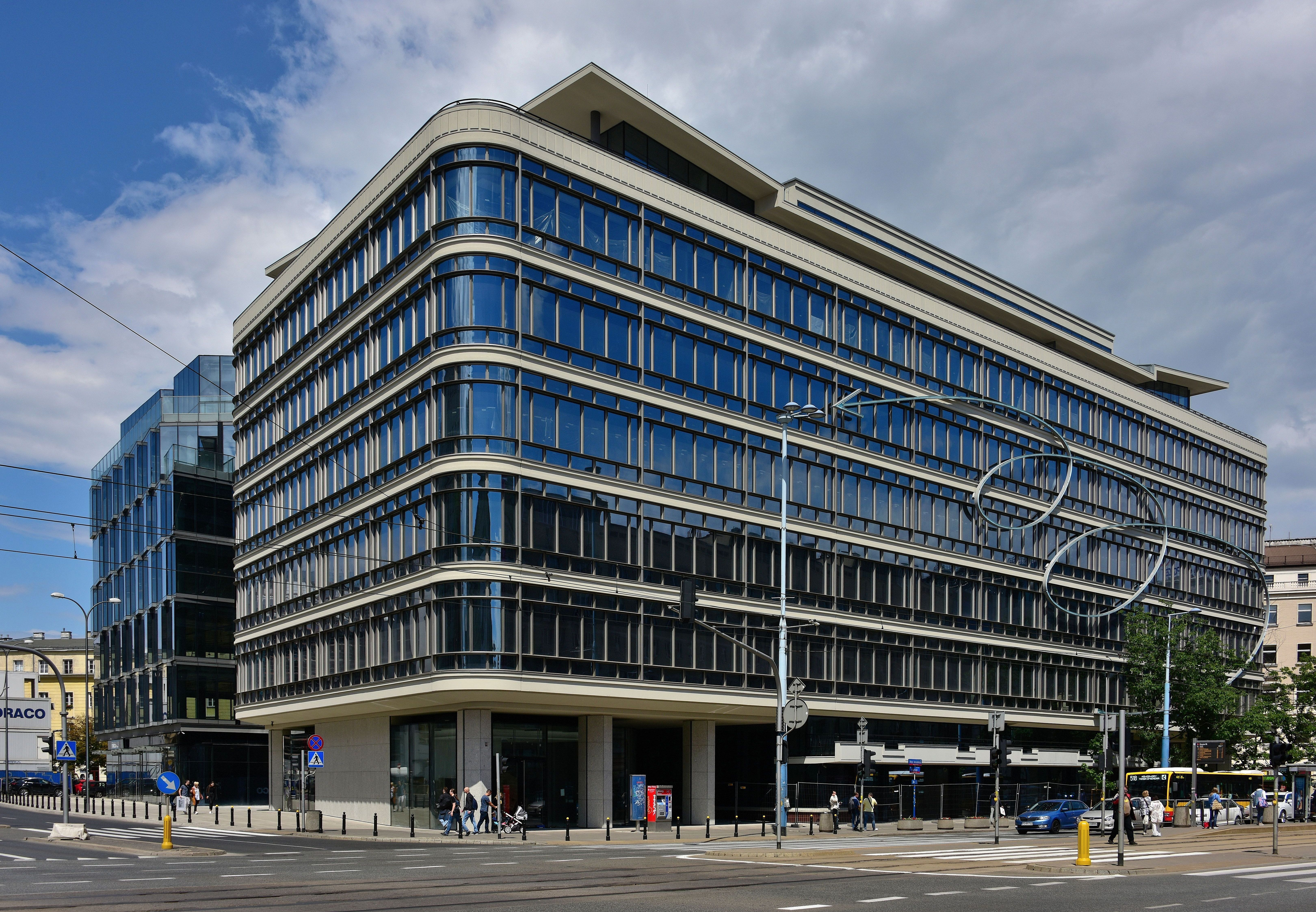 Biurowiec Cedet (dawny Centralny Dom Towarowy) w Warszawie, widok od strony Alej Jerozolimskich.